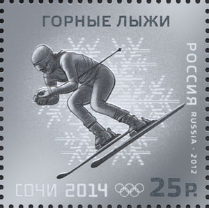 Олимпийские зимние игры в Сочи. Олимпийские зимние виды спорта - Горные лыжи